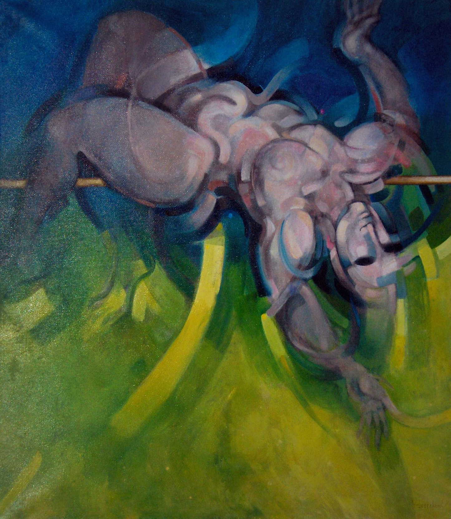 Hoogspringer 1989 Acryl op doek 150 x 150